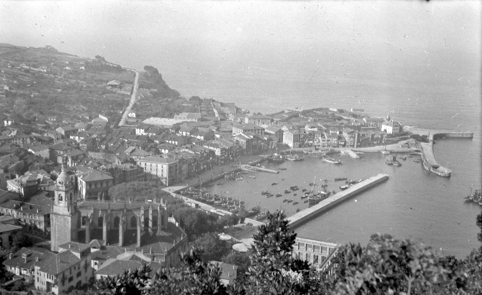 Lekeitioko portua 1945ean, Lumentzatik ikusita.